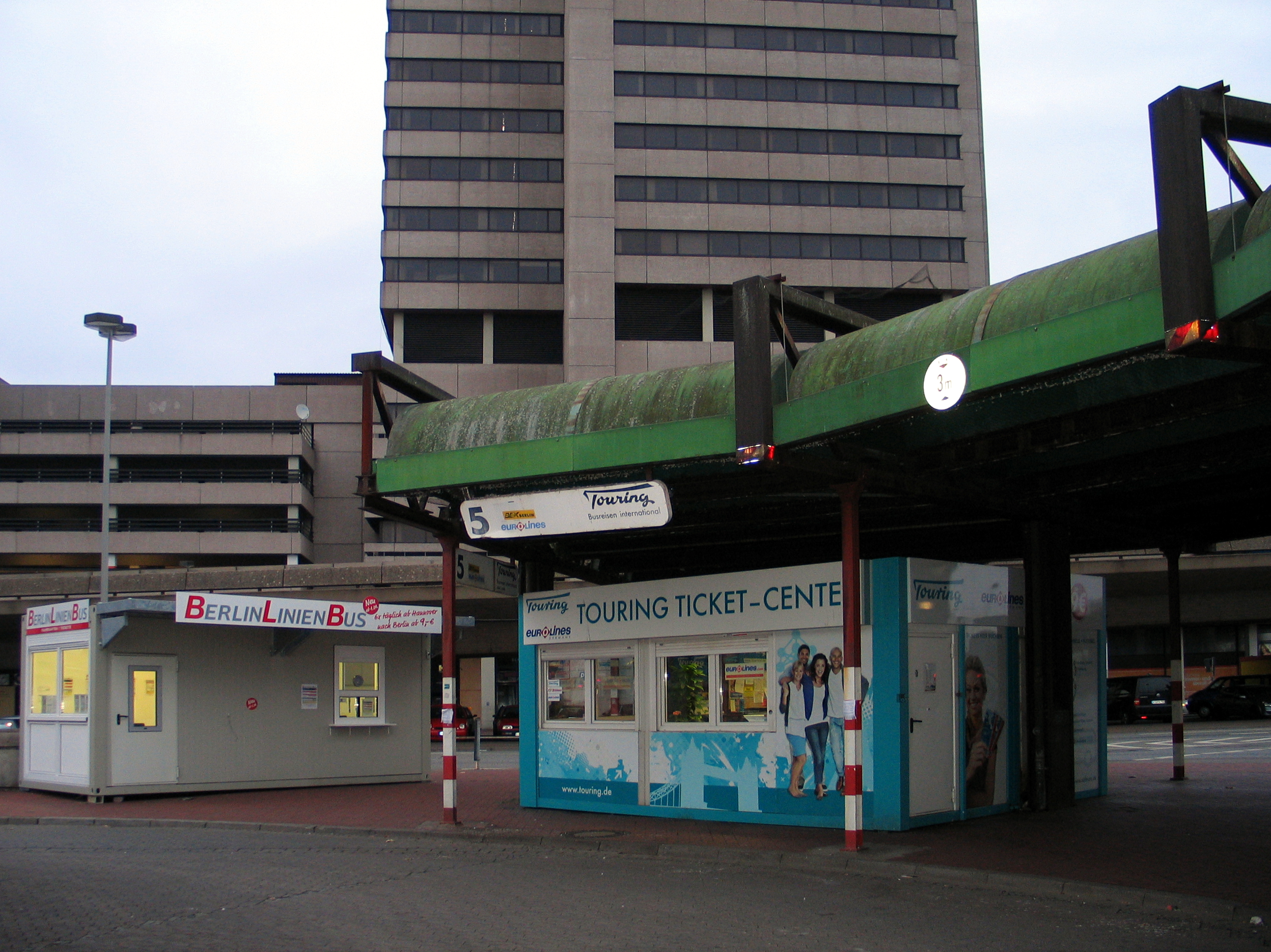 Abriss der 1115 Quadratmeter großen Dachkonstruktion am Zentralen Omnibusbahnhof (ZOB) in Hannover zwischen dem Hauptbahnhof und dem Bredero-Hochhaus (Lister Tor) ....